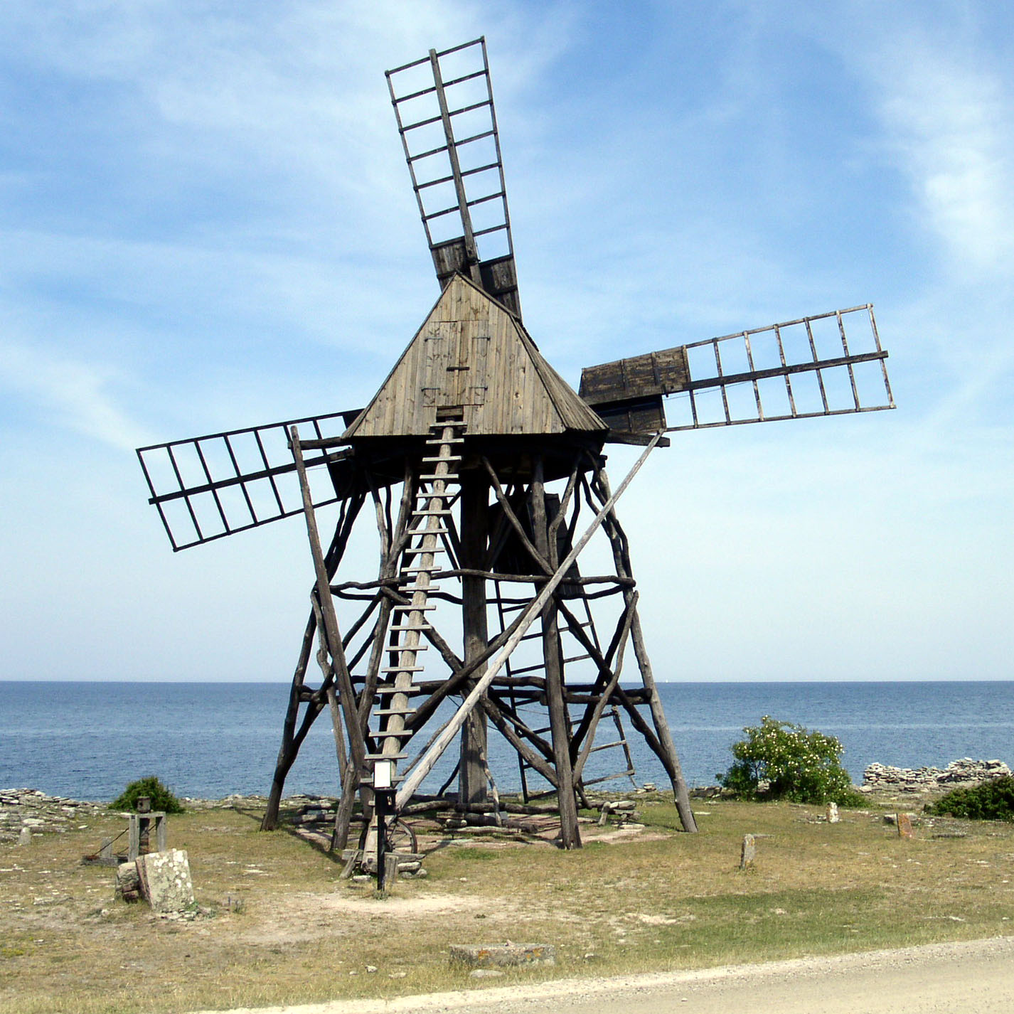 Vinddrivet skurverk (för beredning av kalksten) vid Jordhamn, Öland